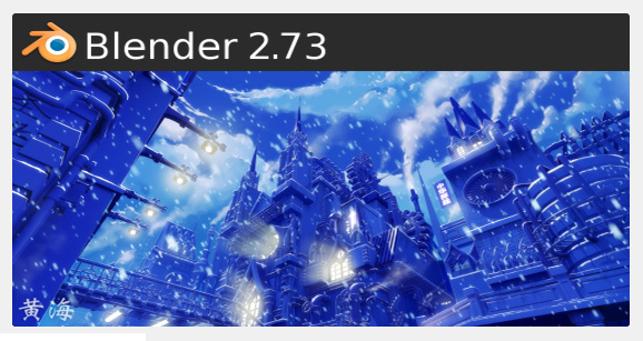 Blender 2.73 Splash Blender Foundation - Blender